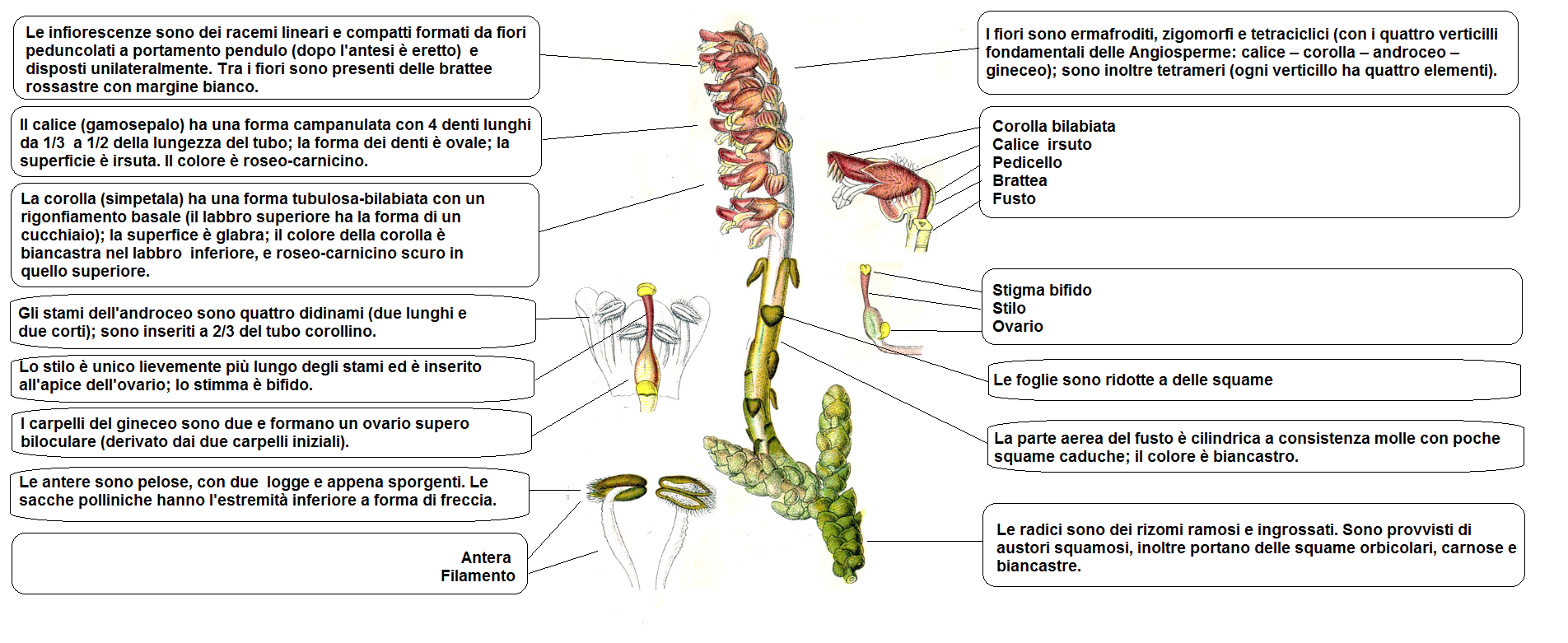 Lathraea squamaria Strum DESC